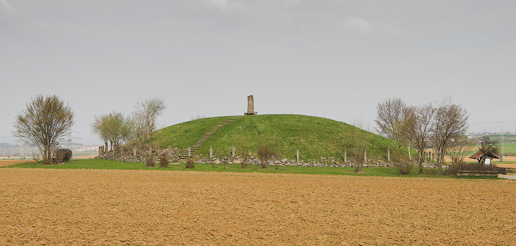 Keltengrabhügel Hochdorf/Enz